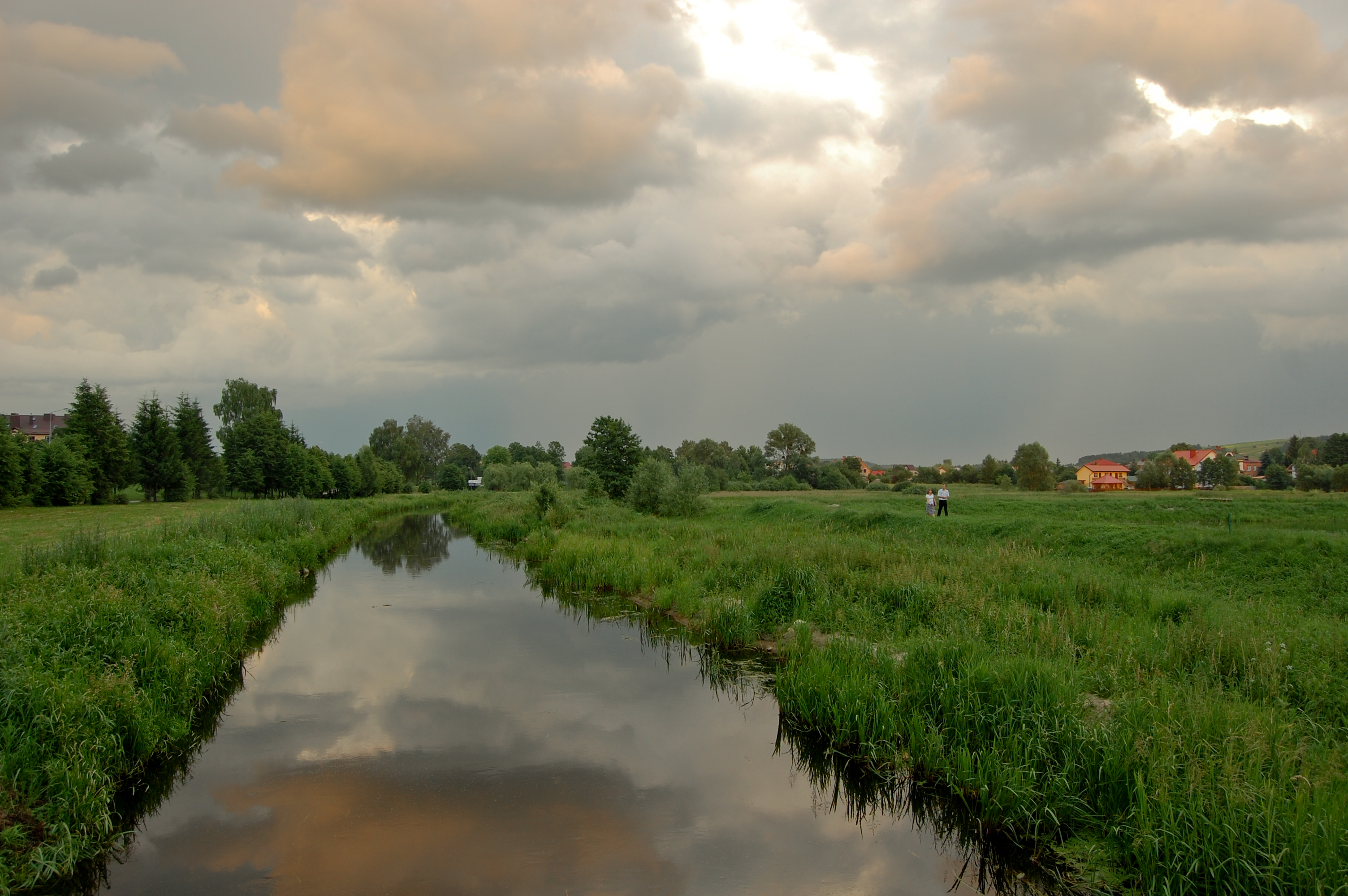 Krasnobród, rzeka Wieprz